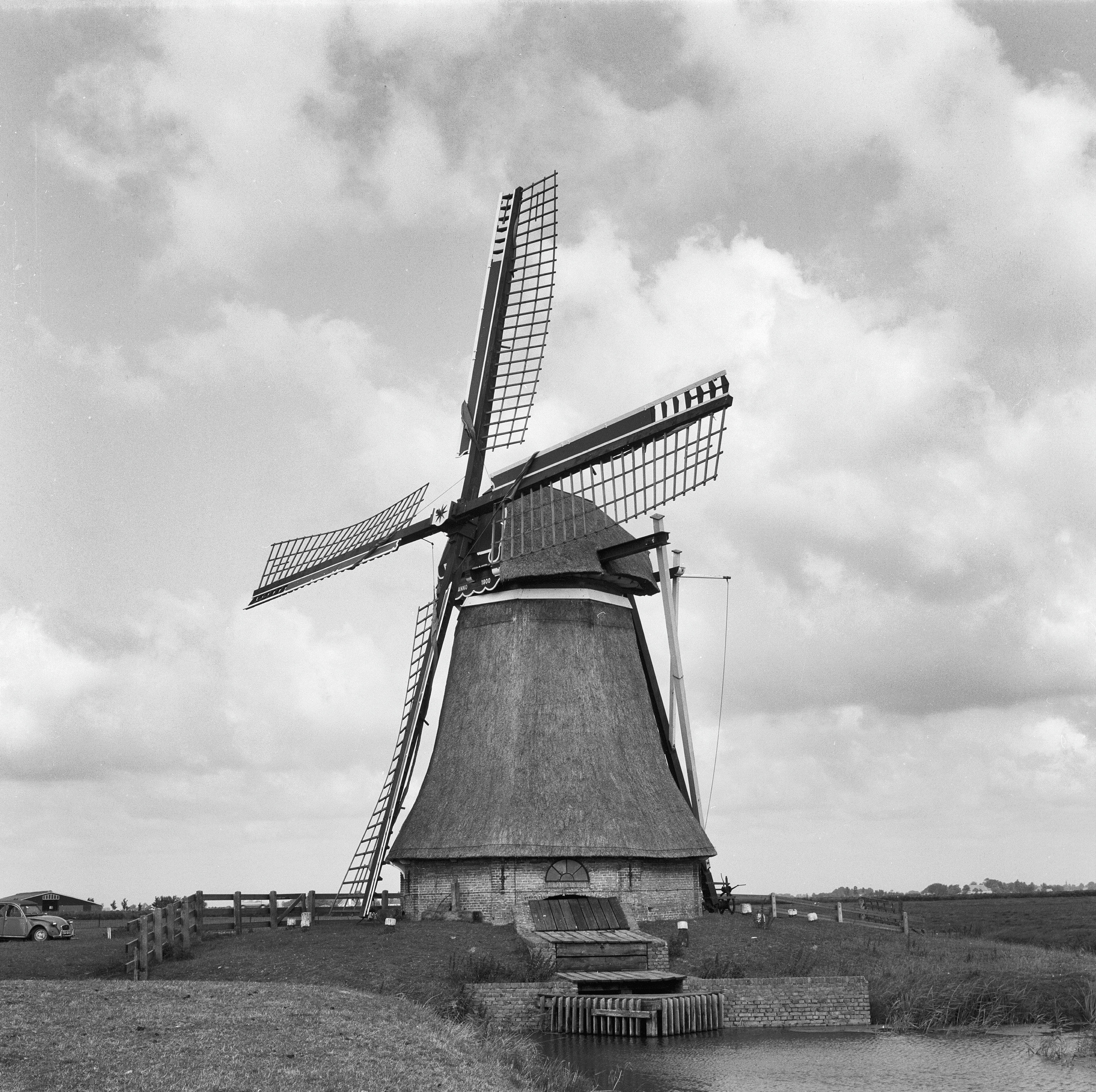 watermolen "De Pannekoekstermolen" van de Oosthemmerpolder, exterieur